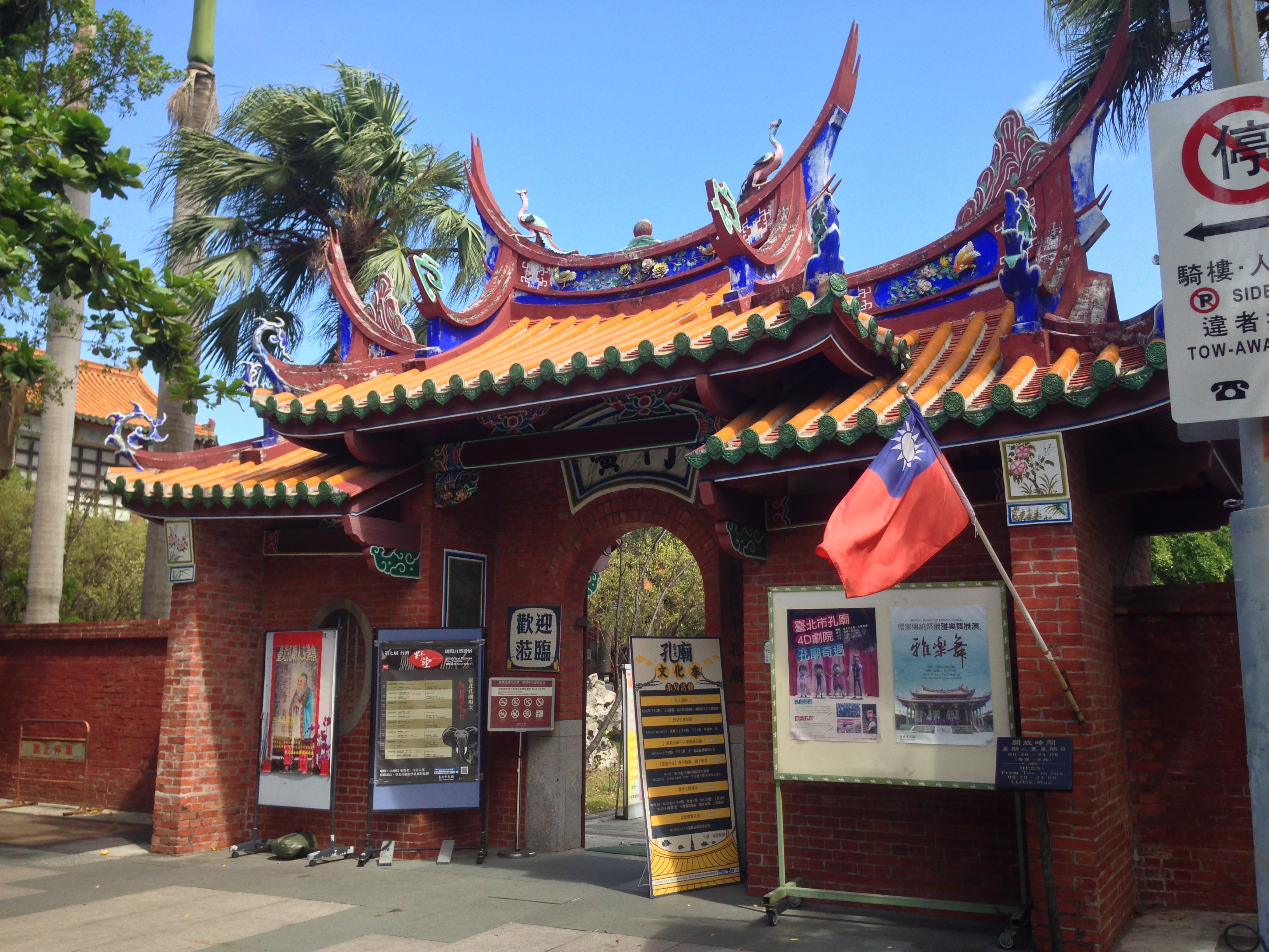 中文（台灣）: 台北孔子廟黌門